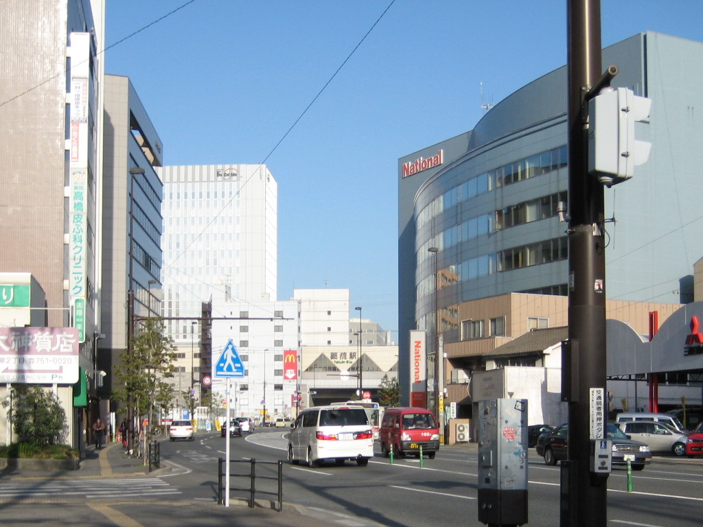 Yakuin Station,Fukuoka